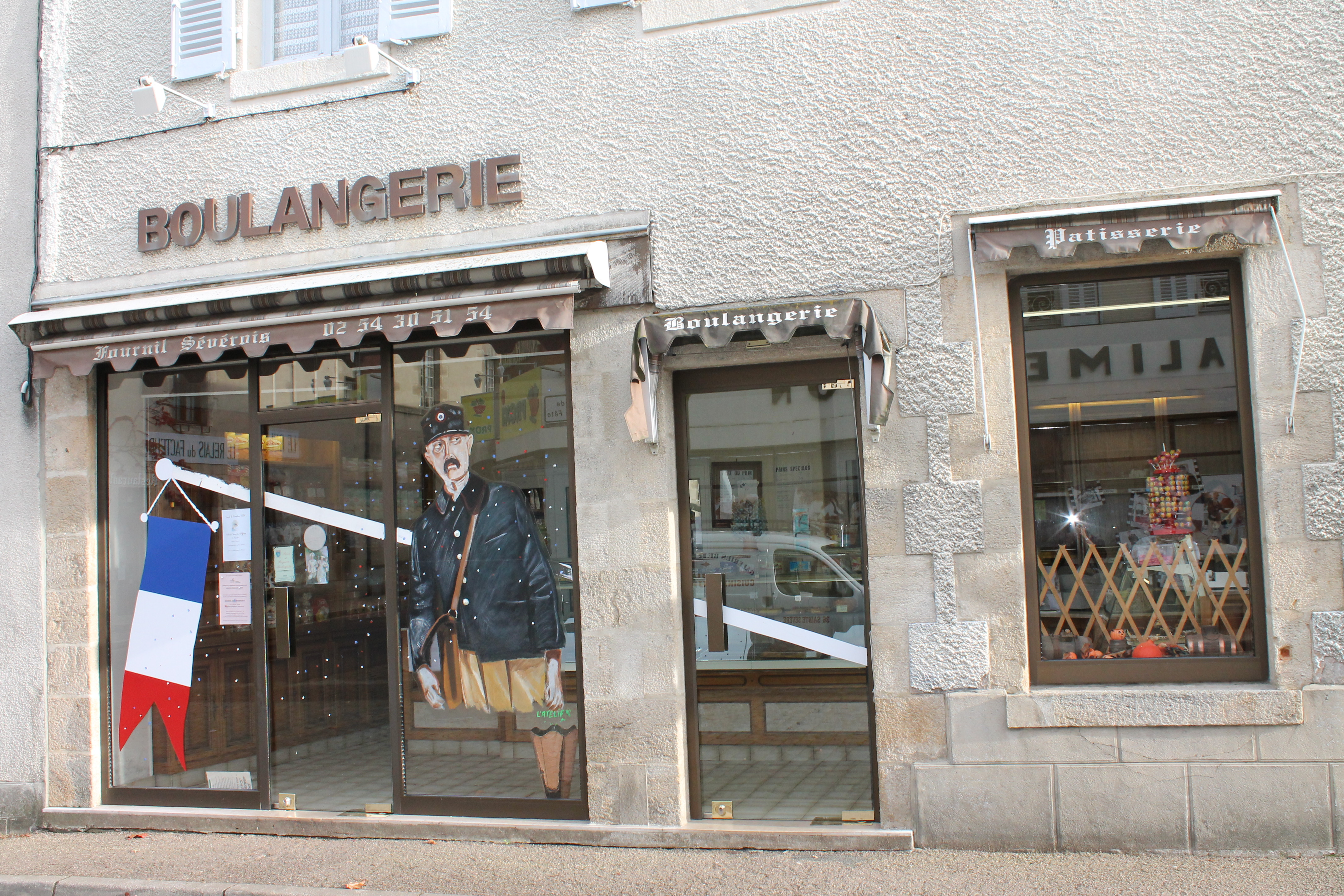 La boulangerie